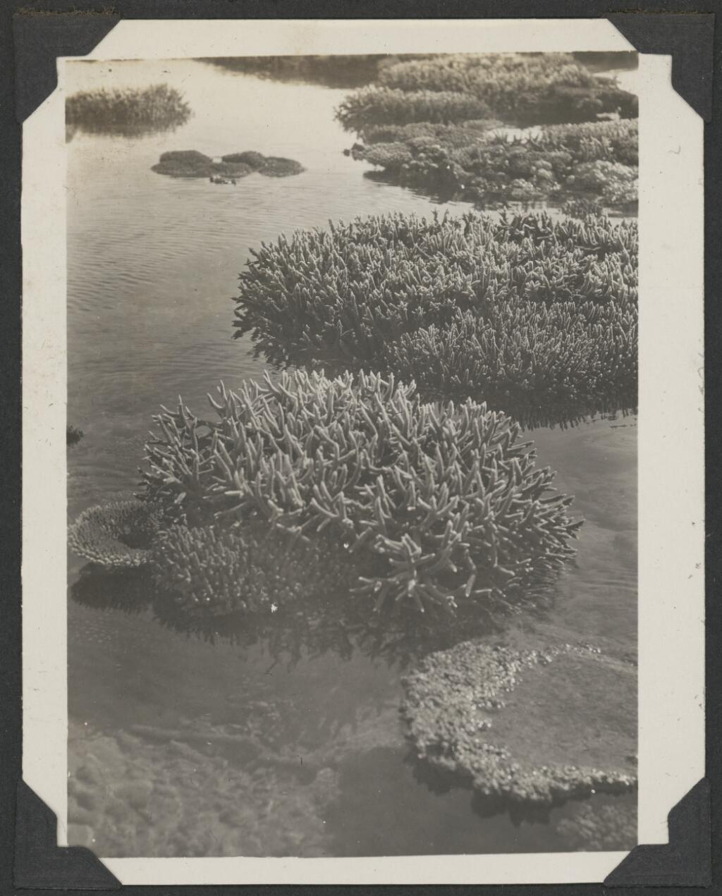 Yonge, C. M. (Charles Maurice), 1899-1986 Persistent URL .au/nla.obj-145107990